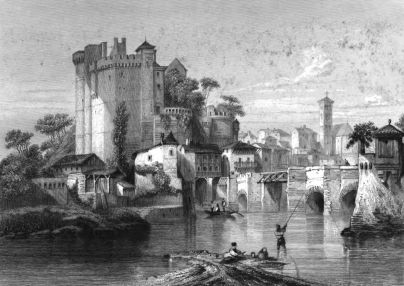 Vue du chateau de Clisson avant la Révolution